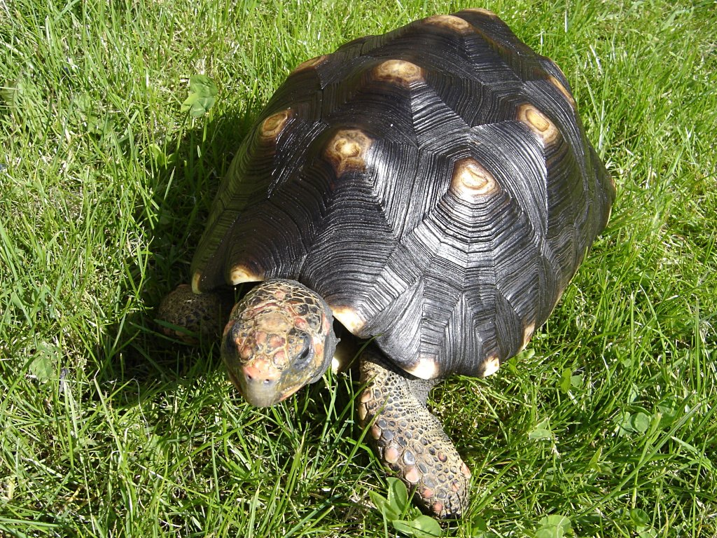 Geochelone carbonaria (femelle)